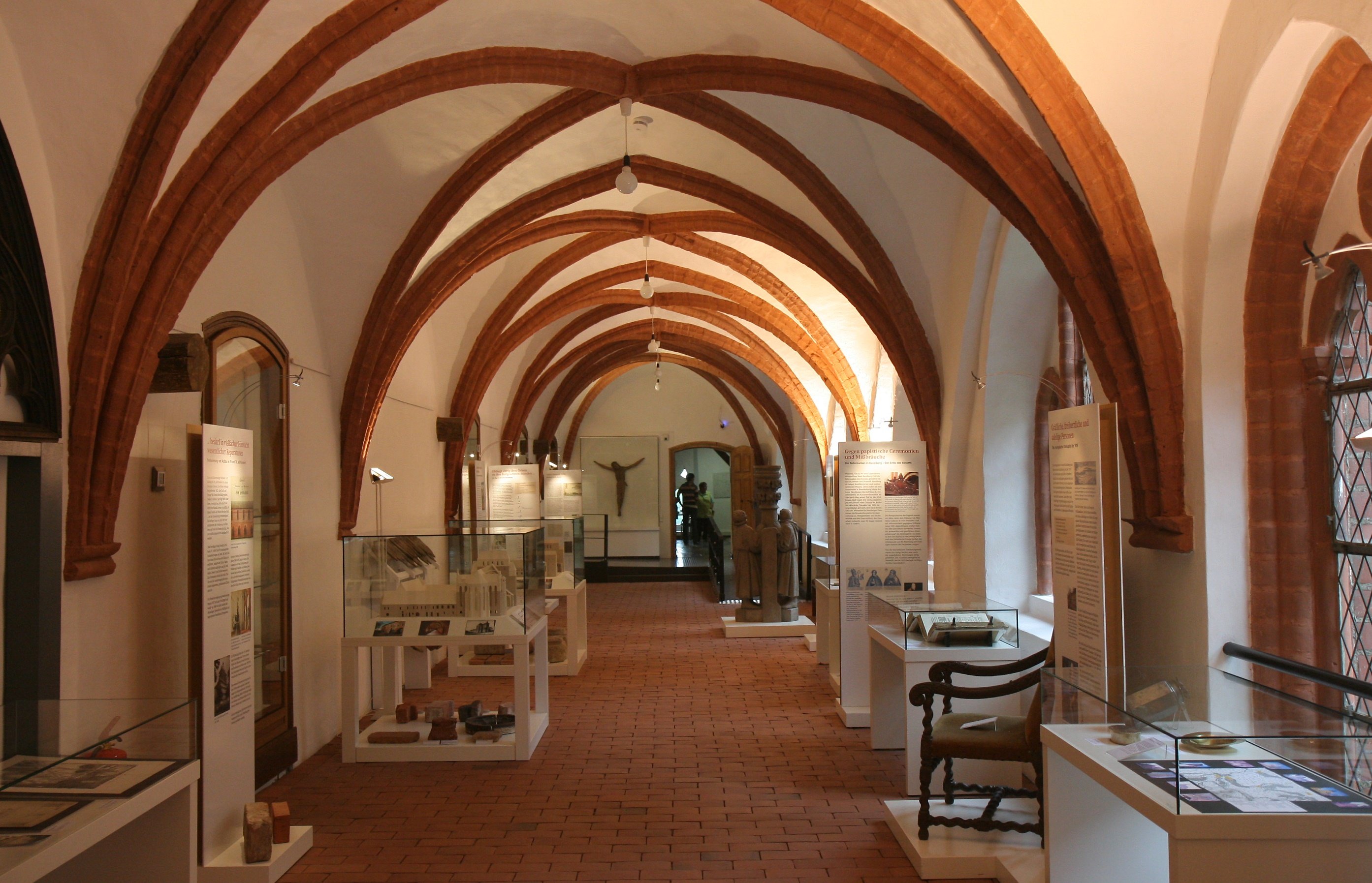 Prignitz-Museum in Havelberg, Domplatz 3.